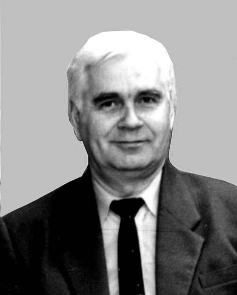 Игорь Григорьевич Урсов Igor Grigorievich Ursov